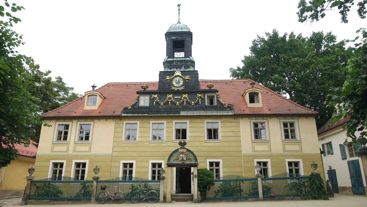 Herrenhaus, Hotel "Haus Sorgenfrei" Augustusweg 48